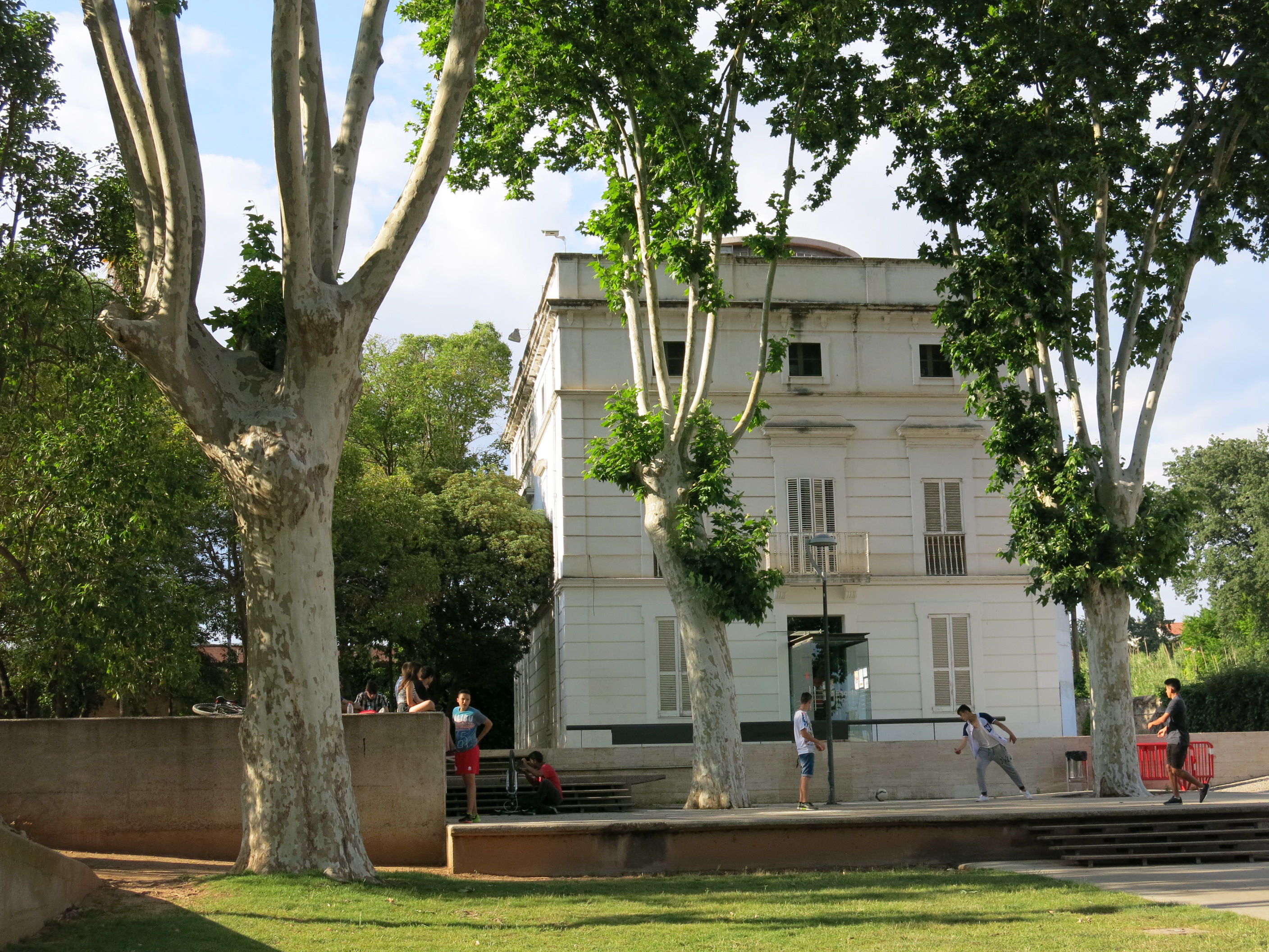 Escola de Música, antiga casa del director de la Linera (Parets del Vallès)